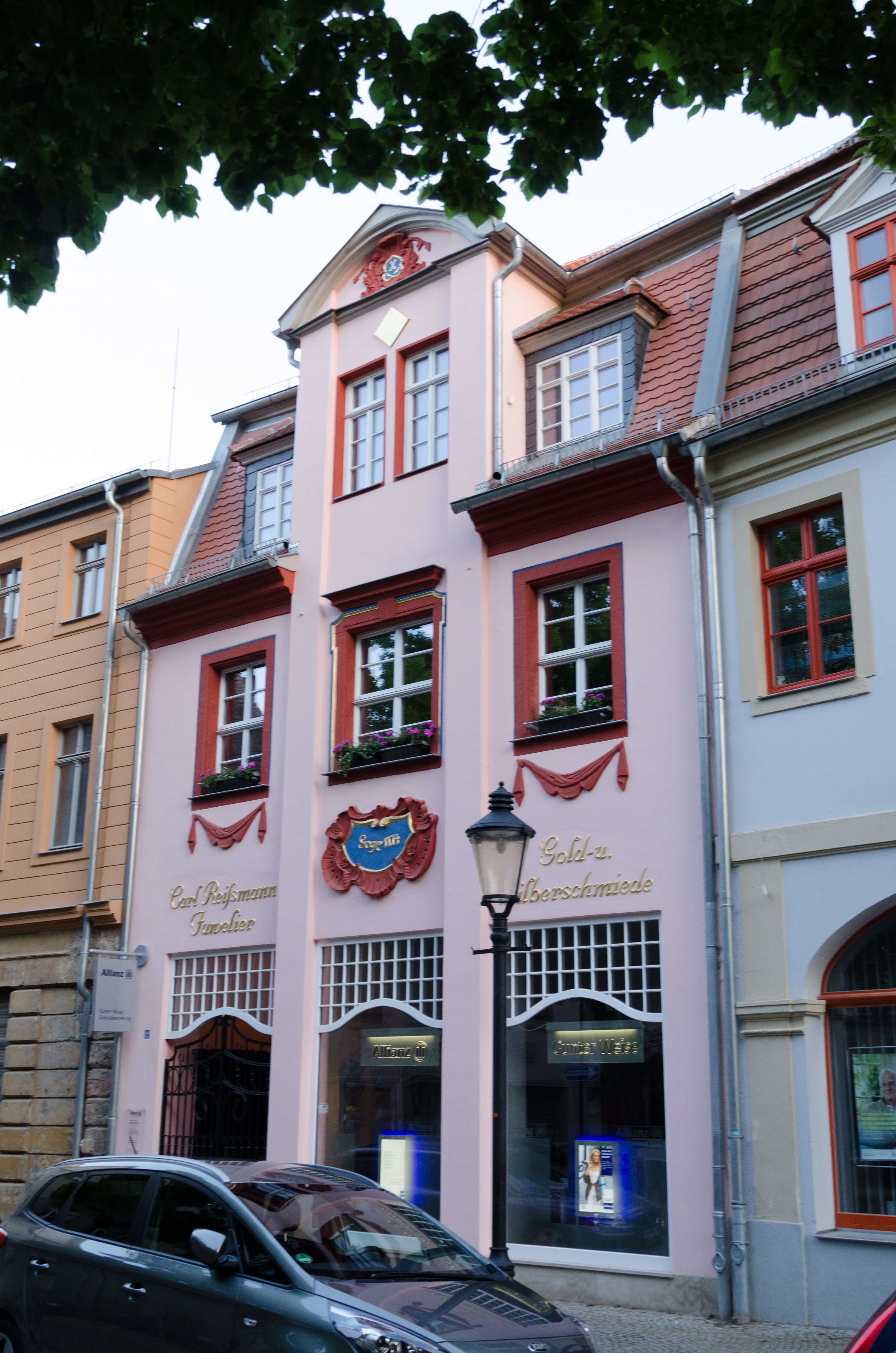 Naumburg, Topfmarkt 12